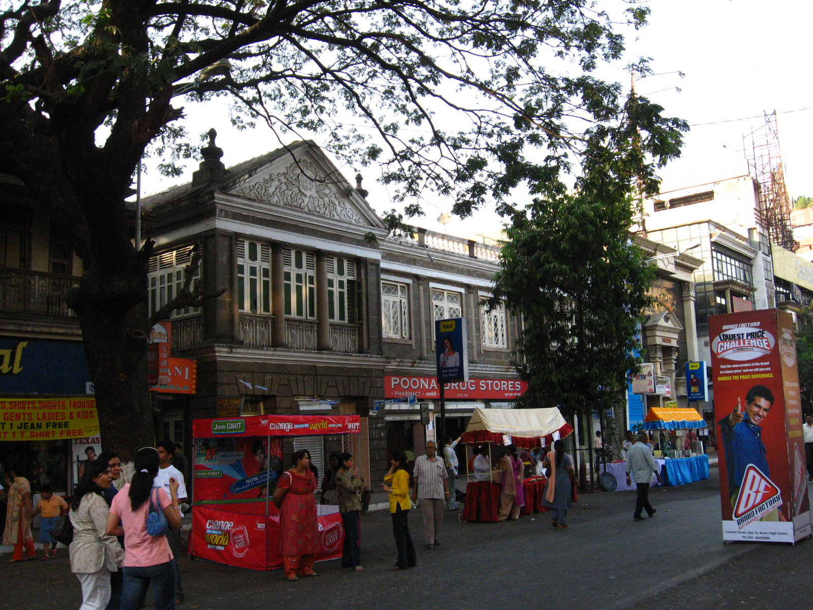 Poona Drug Store Building